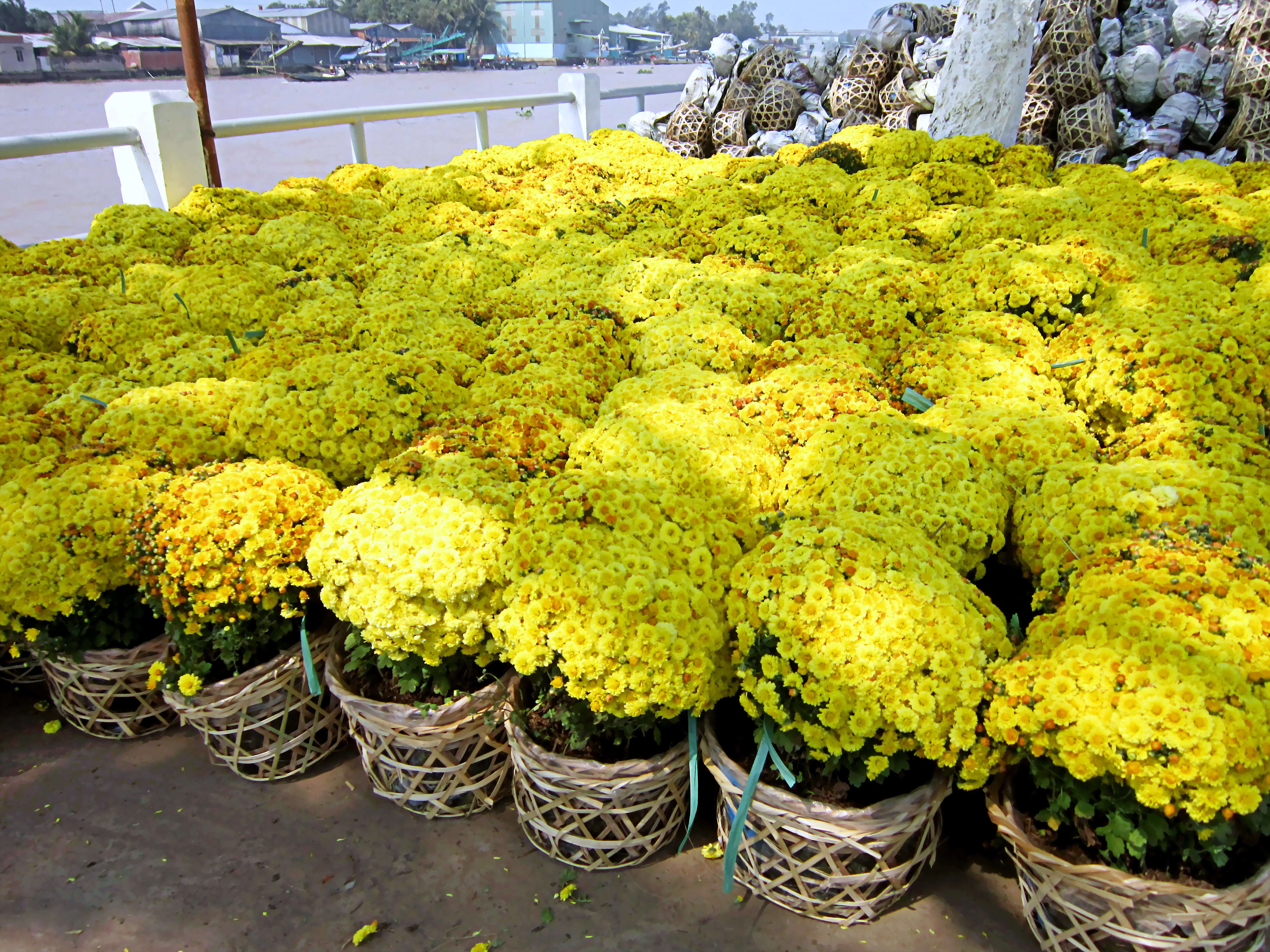 Hoa cúc mâm xôi (Chrysanthemum morifolium) được bày bán ở Tân Quý Đông, thành phố Sa Đéc, tỉnh Đồng Tháp, Việt Nam.